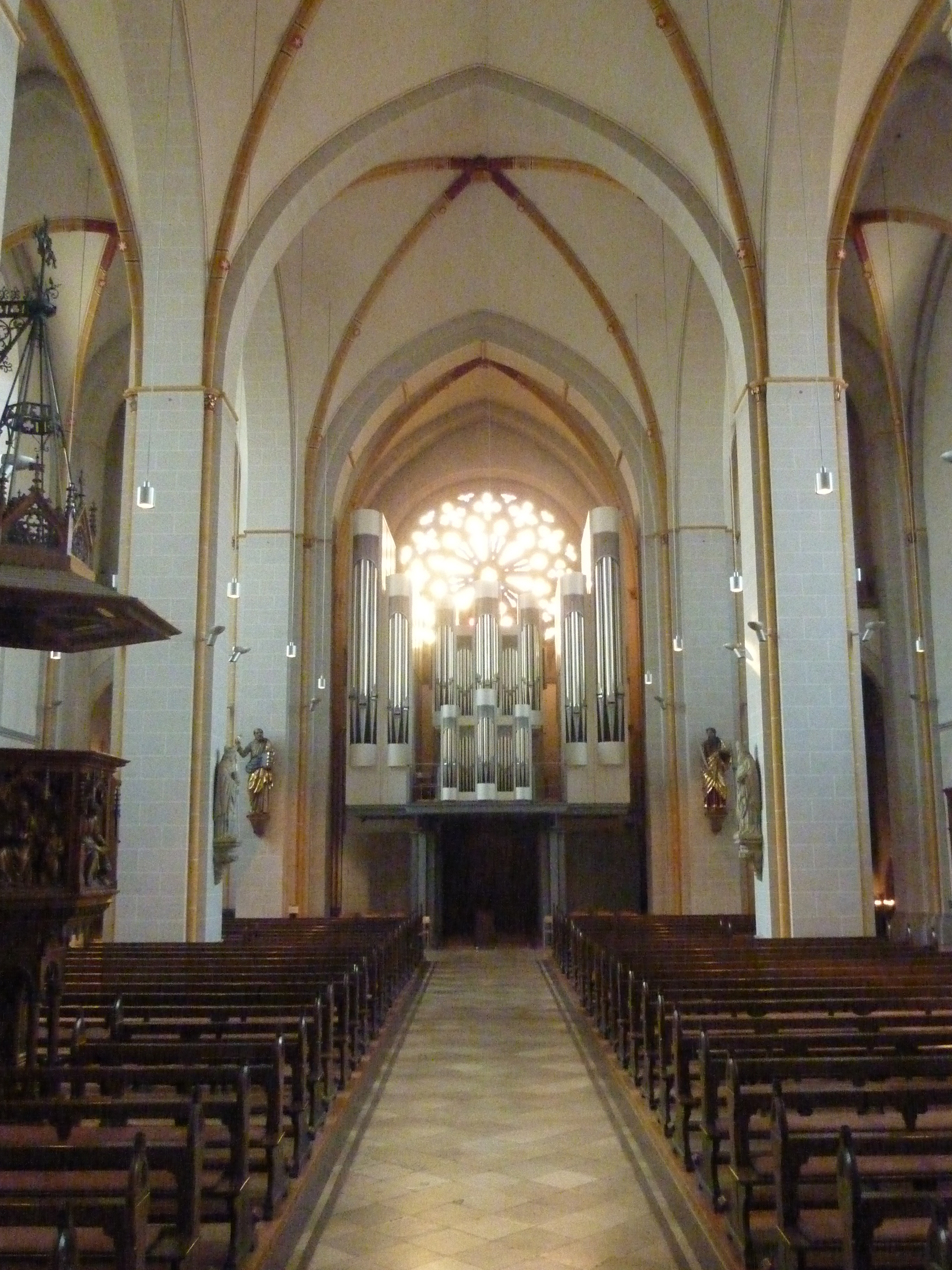 Ansicht der ehemaligen Stiftskirche St. Johann. Heutiger Bau ab 1256 entstanden, erster nachweisbarer Bau 1011. Hallenkirche. Hier Innenansicht zur Orgel im Westen.